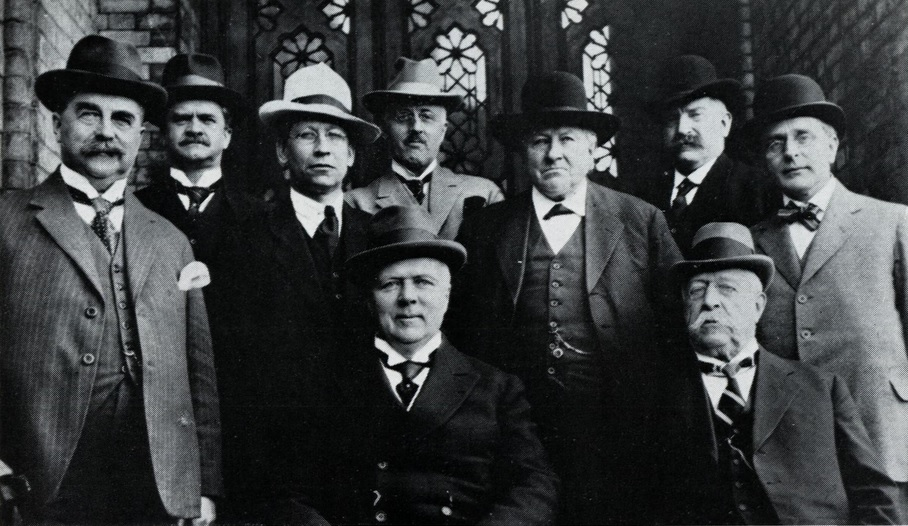 Otto Blehrs regjering, etter at Johan Ludwig Mowinckel (foran, til venstre) hadde overtatt som utenriksminister. Statsminister Otto Blehr foran, til høyre. Bak, fra venstre: Forsvarsminister Ivar Aavatsmark, provianteringsminister Rasmus Olai Mortensen, landbruksminister Håkon Five, justisminister Arnold Holmboe, kirkeminister Martin Olsen Nalum, arbeidsminister Ole Monsen Mjelde og sosialminister Lars Oftedal.